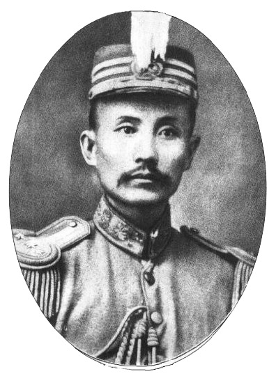 范石生（1887年－1939年）